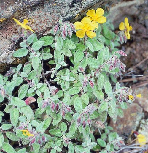 Especie de distribución muy local que cuenta con reducidos efectivos en la mayoría de las poblaciones